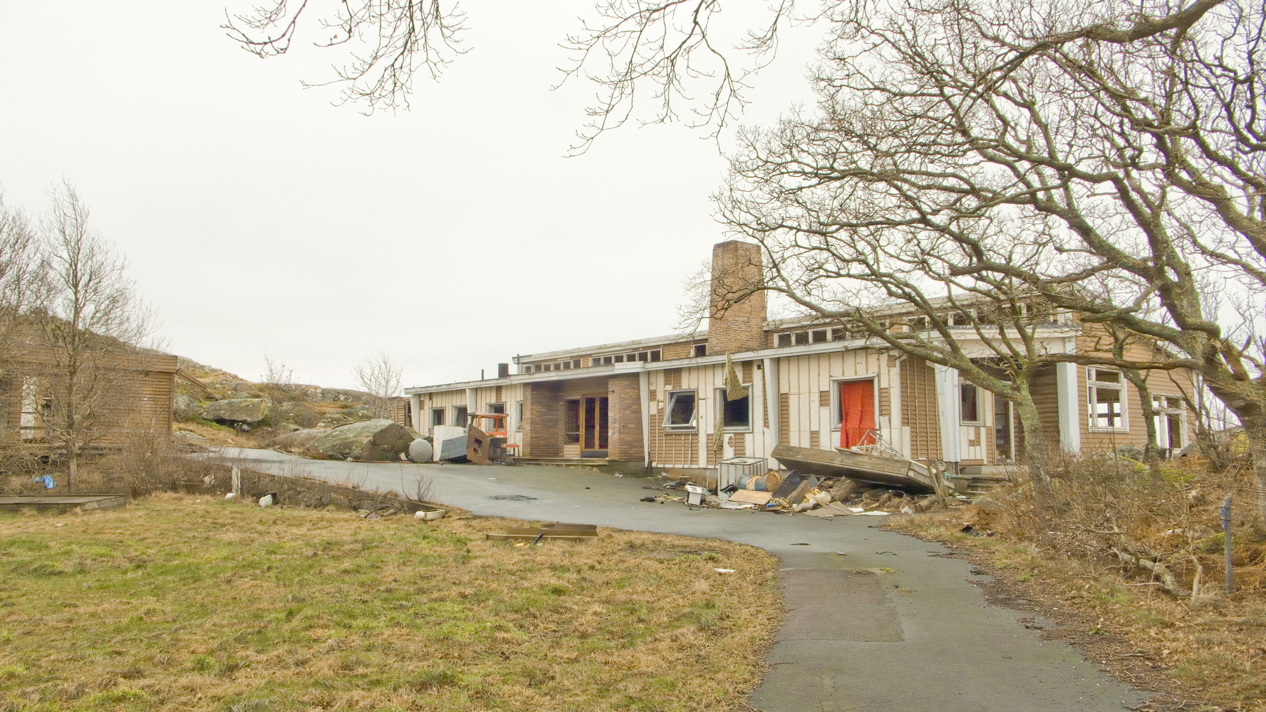 Trälen